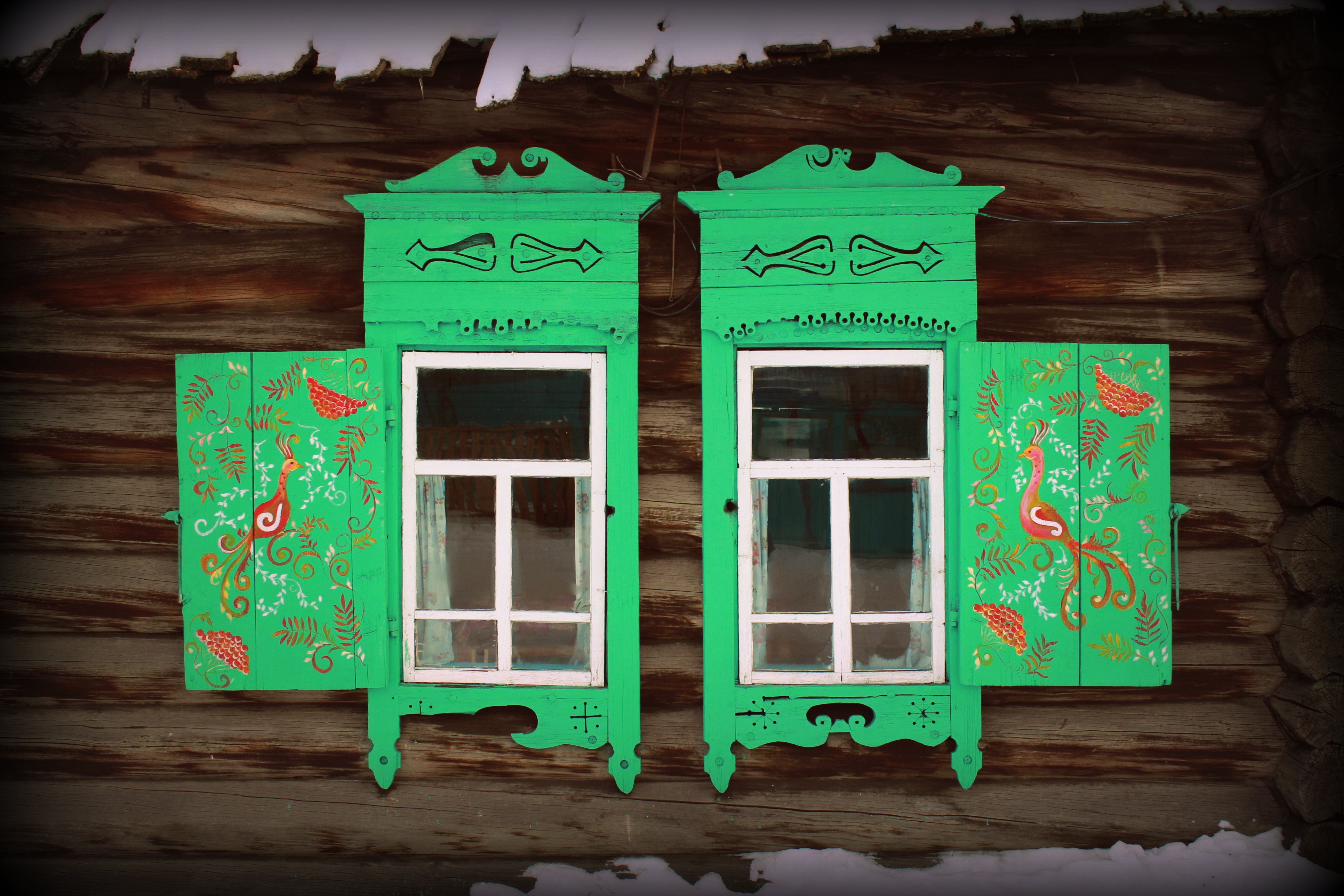 Дом семейских в Новой Бряни. Заиграевский район, Бурятия